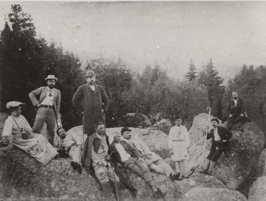 Първият излет на Алеко Константинов до Черни връх, август 1894 г. Седнали (отляво на дясно Радка Кръстева, Никола Висковски, Димитър Илков, Христо Олчев, професор Бончо Боев, д-р Червениванов и Алеко Константинов. Прави: Кръстьо Кръстев, Георги Хаджибонев, водачът от село Владая Димитър Маринов. Снимката е направена от Анастас Иширков.